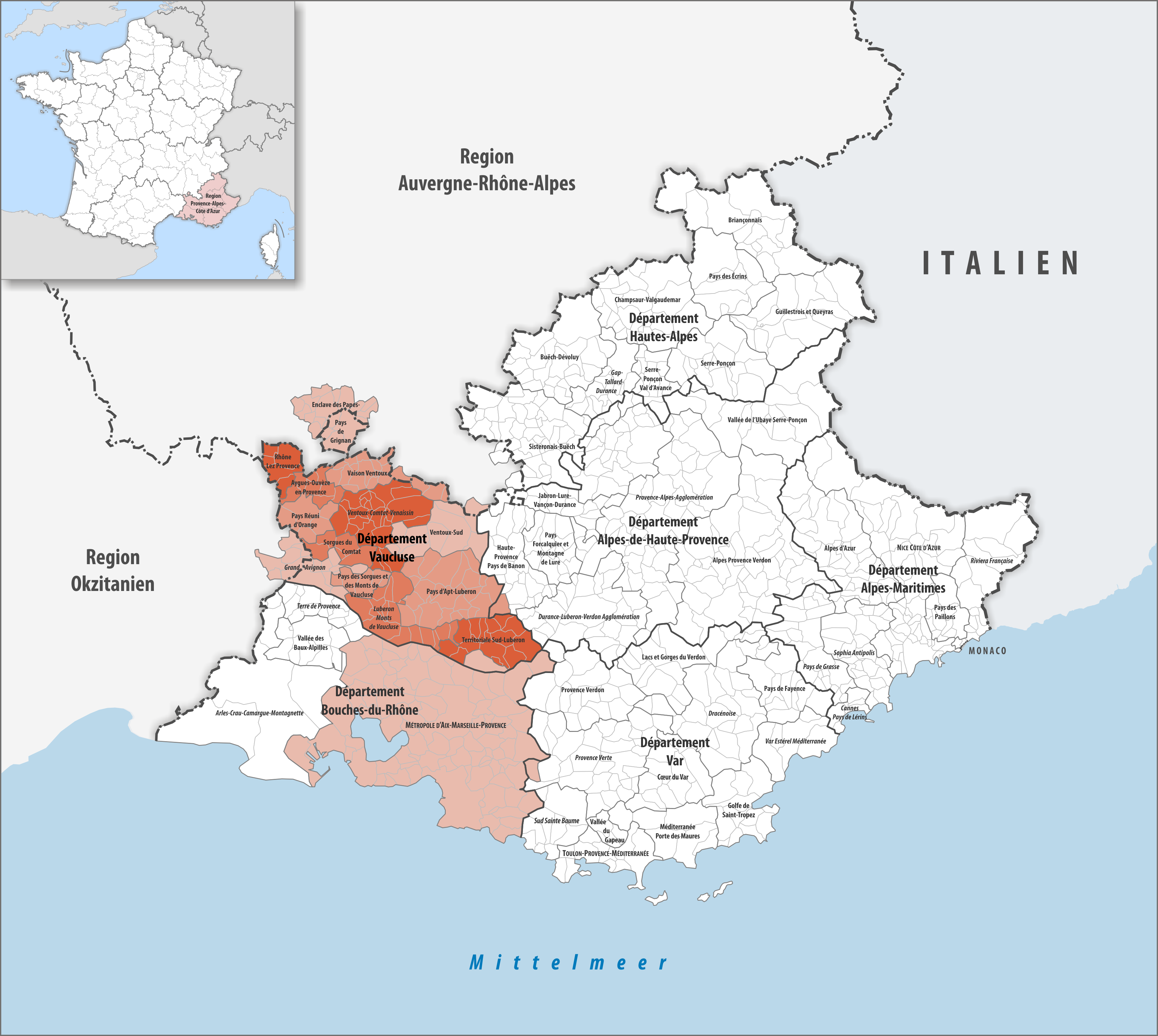 Gemeindeverbände im Département Vaucluse